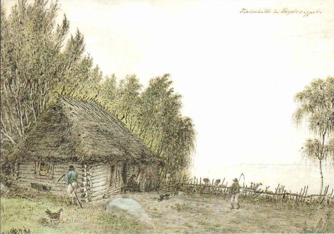 Tallinn Kalurimaja Kopli rannas. Photo about 1830.